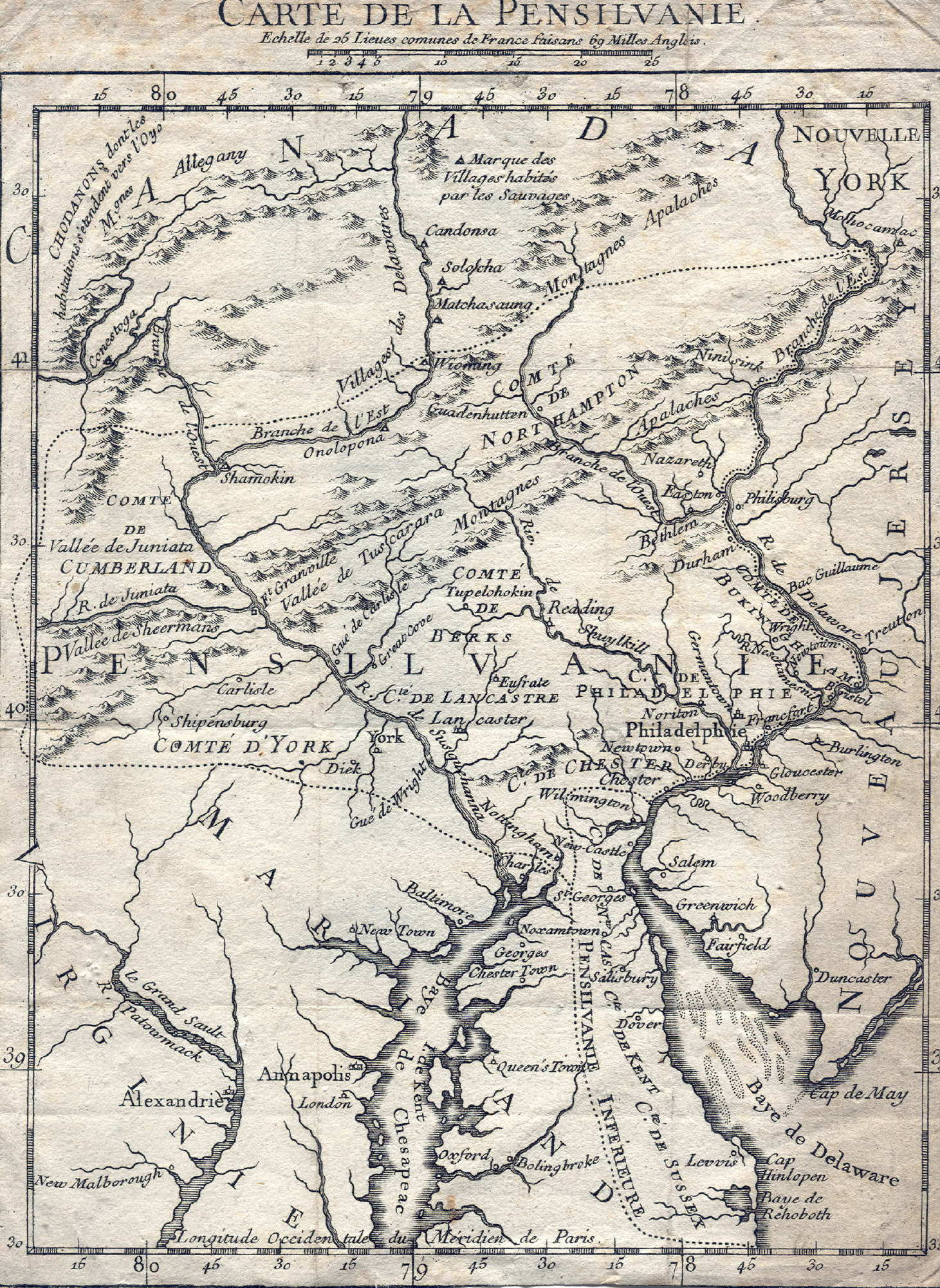 L'abbé J.I. de La Ville, ajouta une description abrégée de la Pensilvanie et une Relation contentant la suite de ce qui s'est passé en Pensilvanie ... et cette carte au livre Etat présent de la Pensilvanie ... par William Smith, Paris 1756.